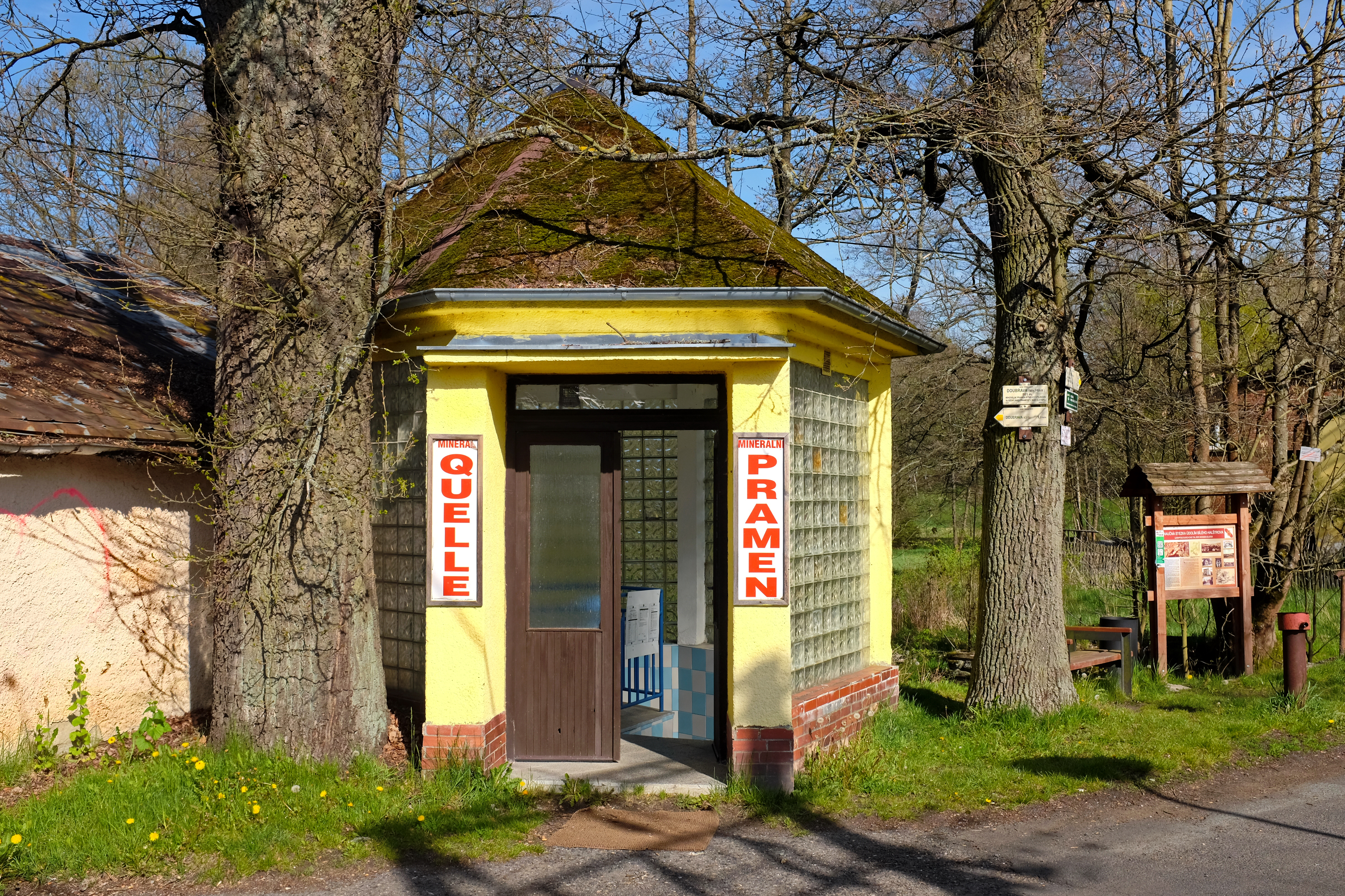 Doubrava, místní část města Aš, minerální pramen ve vesnici, Smrčiny, okres Cheb